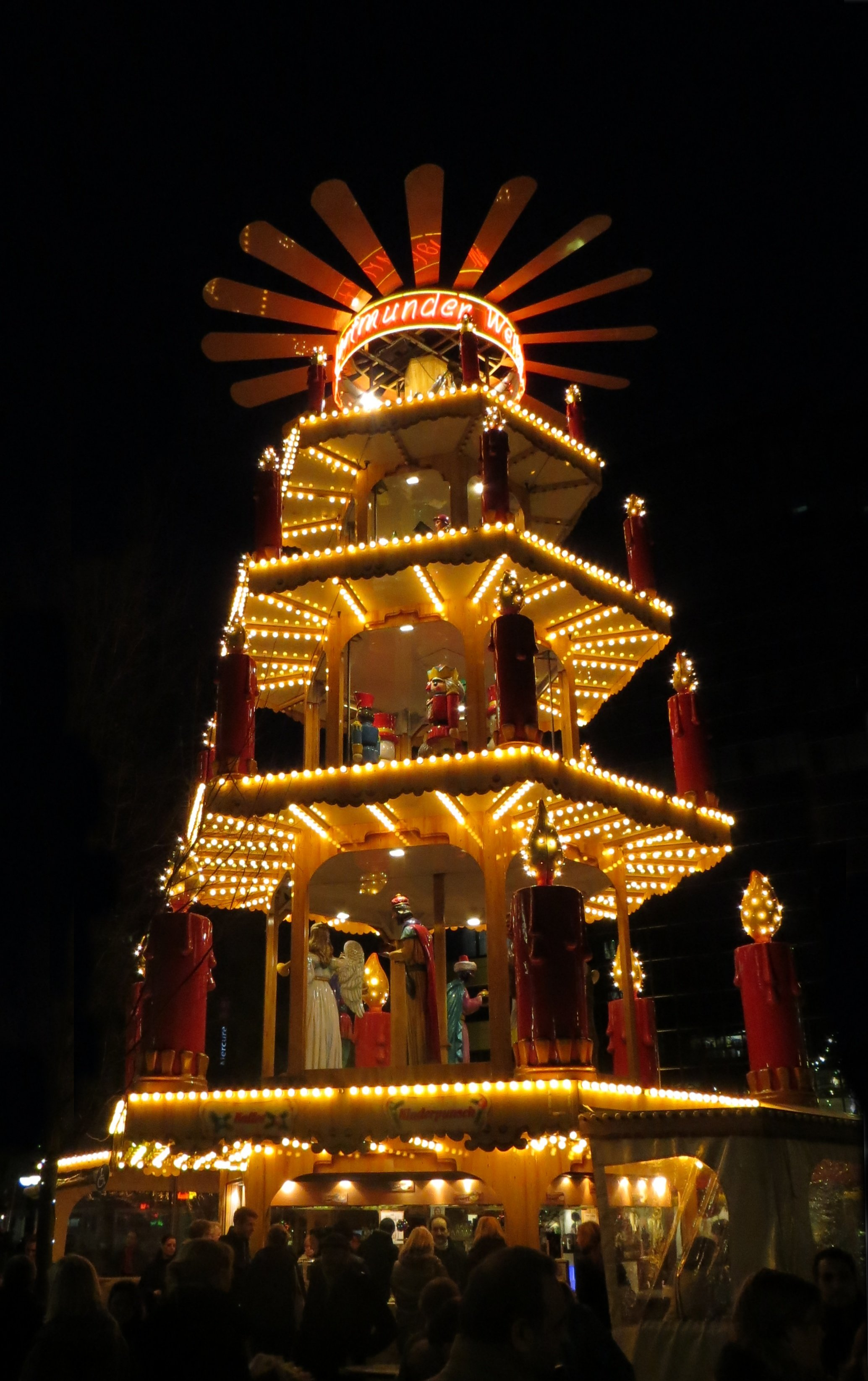 Weihnachtspyramide auf dem Weihnachtsmarkt in Dortmund